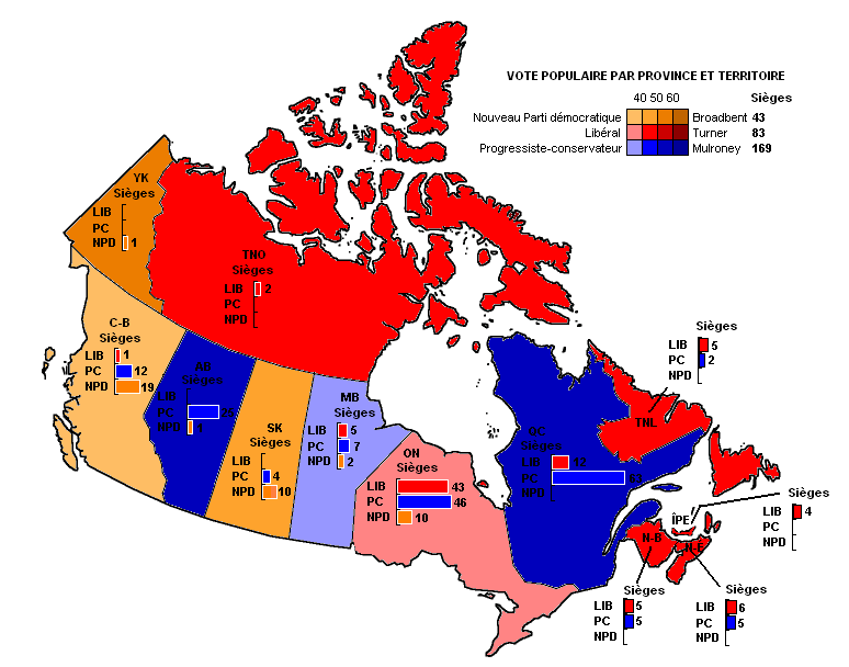 Carte du Canada démontrant le vote populaire lors de l'élection de 1988 avec barres graphiques démontrant le total des sièges de chaque province et territoire